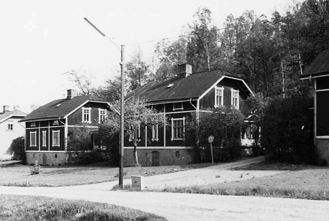 Röda villorna vid Tullingesjön (numera rivna)